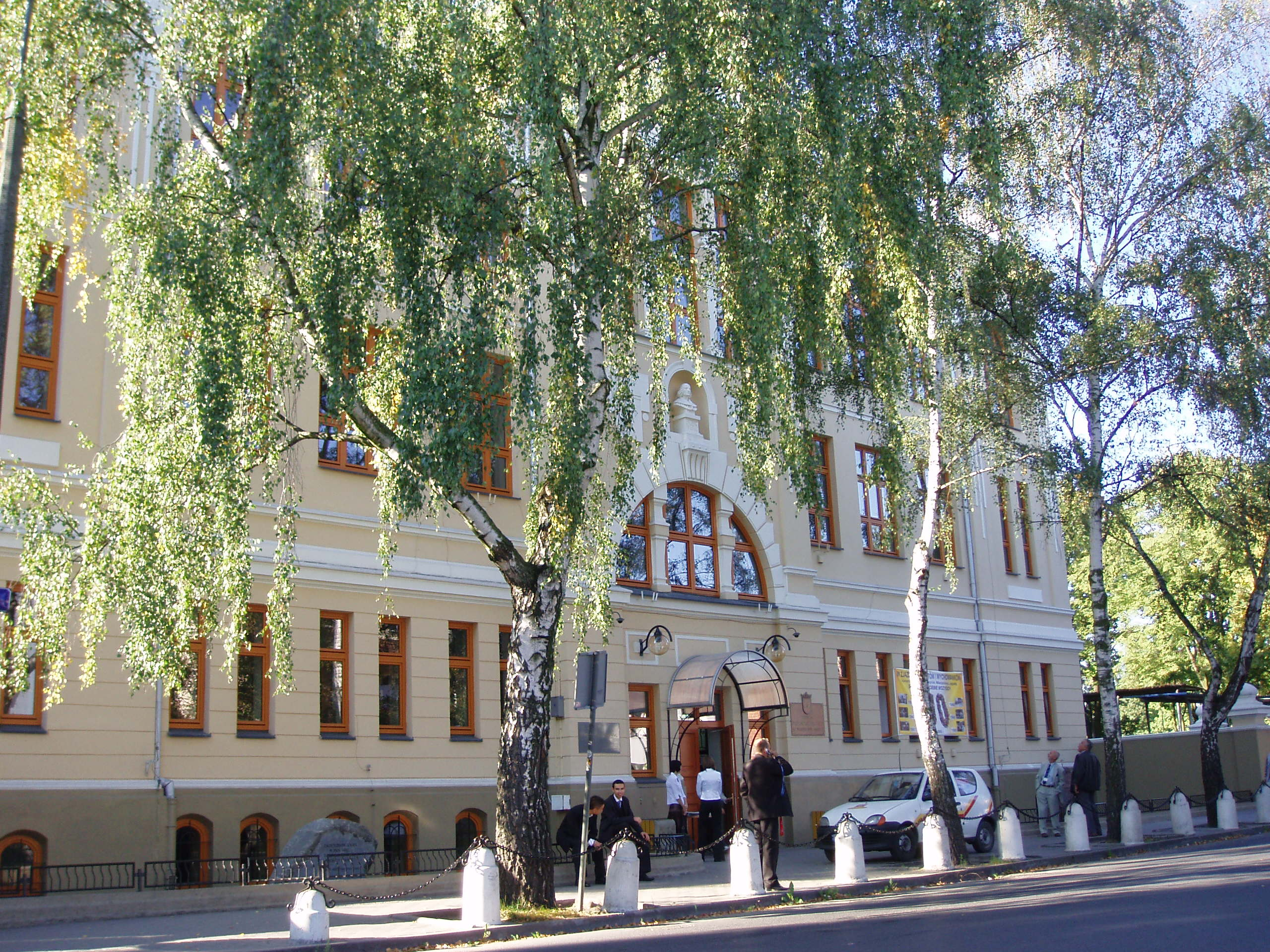 L.O. im W. Jagiełły w Płocku